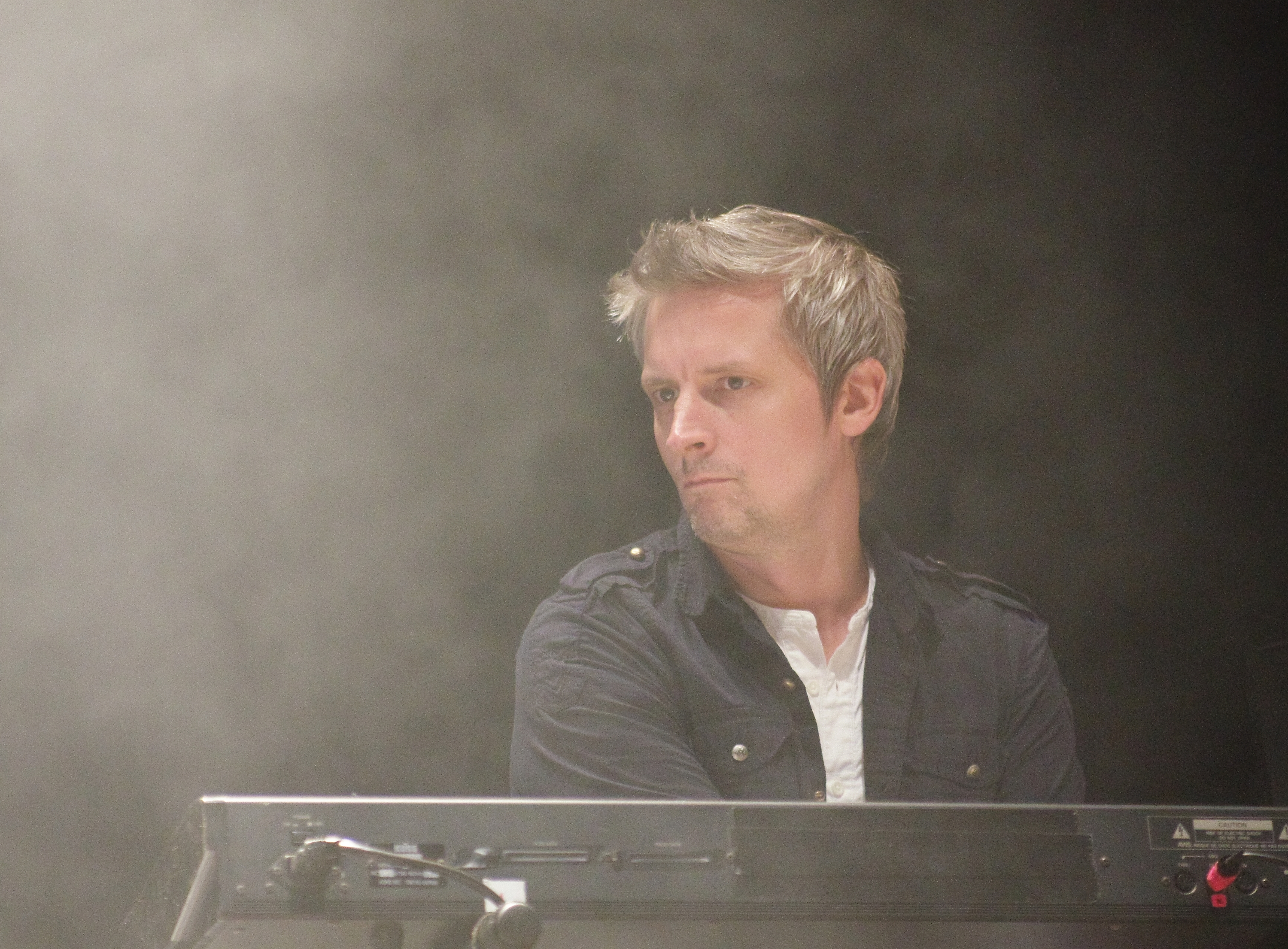 James (band) auf dem Haldern Pop Festival 2013. Hauptbühne. Besetzung: Tim Booth (Gesang) Jim Glennie (Bass) Larry Gott (Gitarre) Saul Davies (Gitarre, Violine, Percussion) Mark Hunter (Keyboards) Dave Baynton-Power (Schlagzeug) Andy Diagram (Trompete, Percussion)